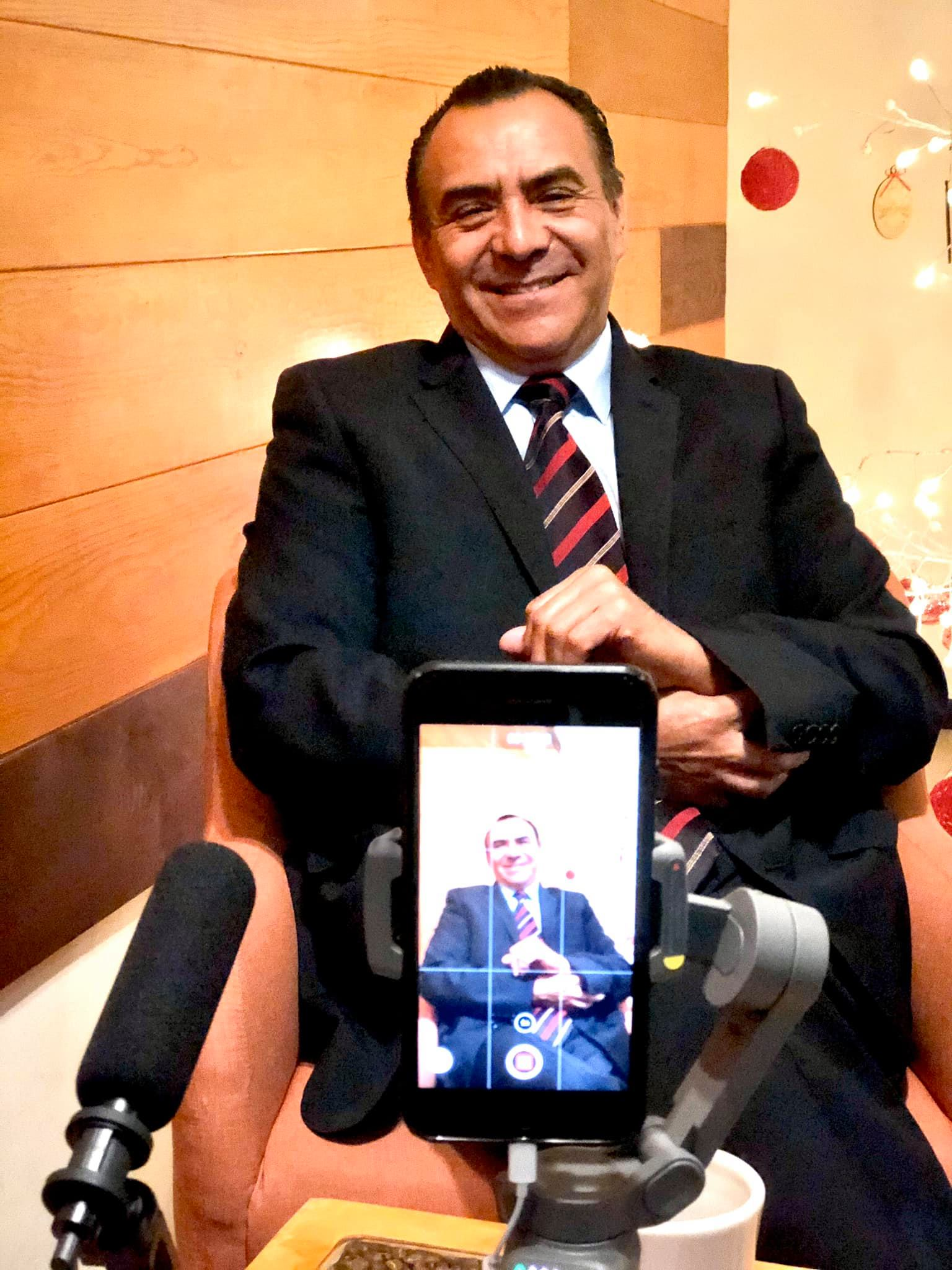 Alejandro Oaxaca, grabando una video columna semanal que distribuye en sus redes sociales.